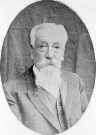 Don Joaquín Eguía Lis, 1º Rector de la Universidad Nacional Autónoma de México (UNAM).